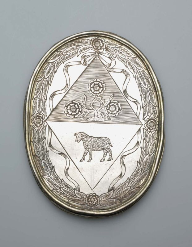 Penning. Rijcklof van Goens had een lange staat van dienst bij de V.O.C. Hij was gouverneur-generaal van Nederlands Oost-Indië in de periode 1678-1680. Gedurende acht jaar was hij gouverneur-generaal van Ceylon. Hij trouwde met de drie jaar oudere weduwe van een luitenant op 13 september 1640. Herdenkingspenningen zoals deze, die ook voorkomen in de vorm van een plaquette met tekst, werden aan familie en vrienden van de overledenen gegeven.Op de voorzijde de inscriptie: 'Tot gedachtenis v.d. Ed.e Godvruchtige Vrouwe Jacomina Rosegaard huijsvrouwe van Rijcklof van Goens raet ordinair van judia Gouvern r Admirael ende Veltoverste de eijlants Ceylon ende de Cust van Malabaer overleden in Colombo den 3n januarij A° 1667 out 50 jaren'. Jacomina Rosegaarde was de eerste echtgenote van Rijcklof van Goens (1619-1682). Het grafschrift van Jacomina van Goens is nog te zien in de Wouwendaalkerk (gebouwd 1749) te Colombo waarheen het was overgebracht uit de Kasteelkerk. Op de achterzijde haar familiewapen in ruitvorm omgeven door een bladkrans. Geen merken.. Zilveren begrafenispenning